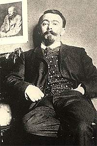 French novelist Charles-Louis Philippe (1874-1909)